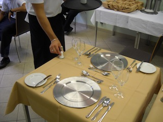 Eindecken von Gasttischen; hier eingedeckter Tisch für 2 Personen.